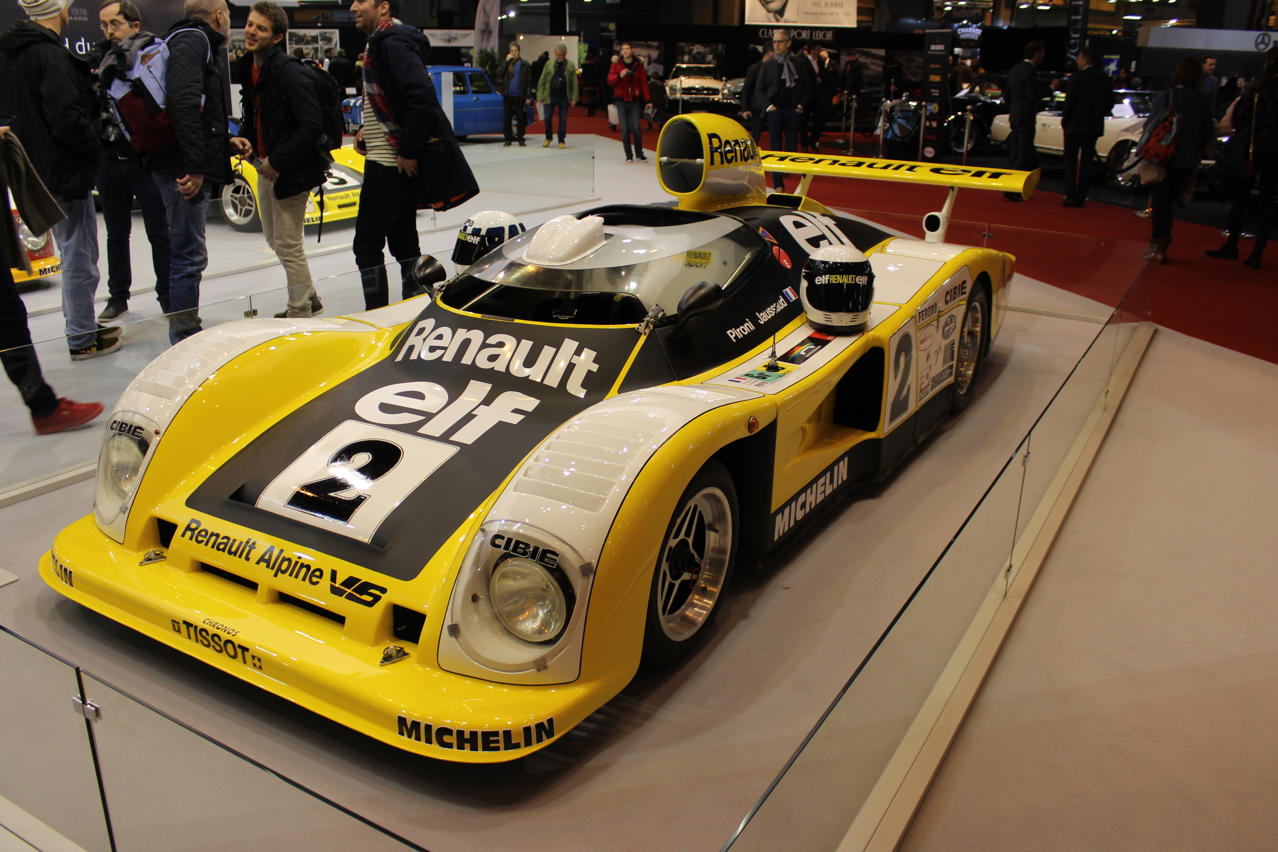 Rétromobile 2018 - 120 ans de Renault